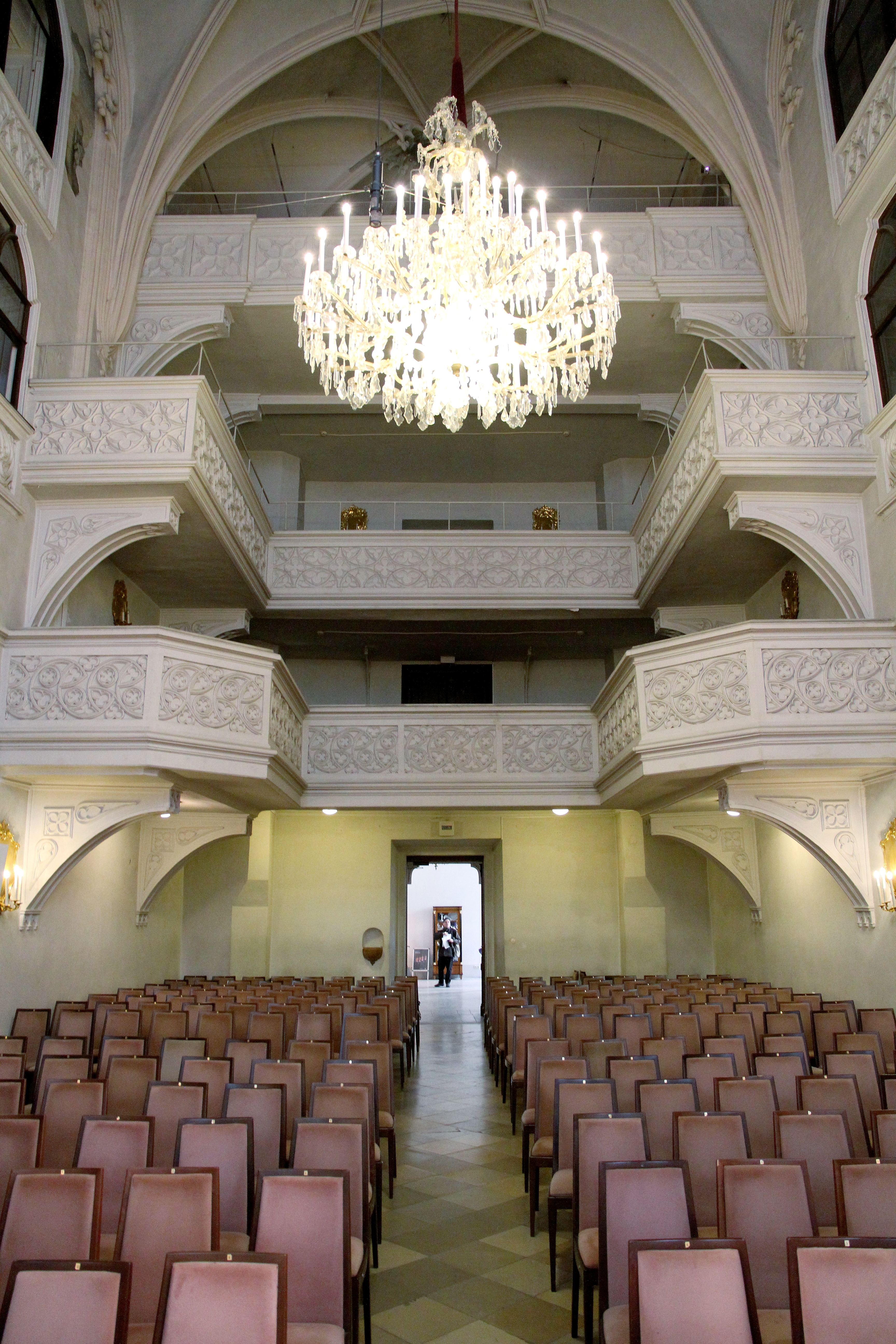 Die Emporen (untere, mittlere und das Orgelempore) der Wiener Hofburgkapelle.